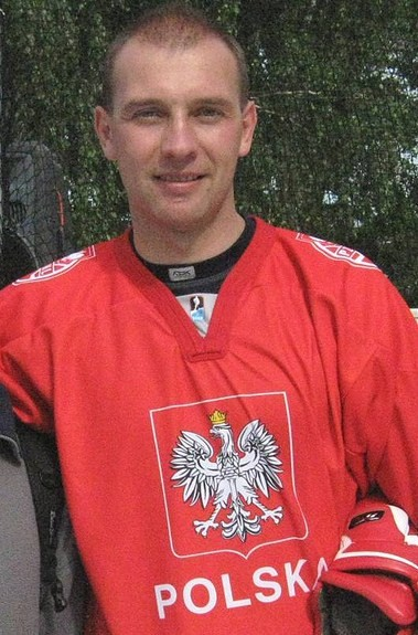 Wojciech Tkacz